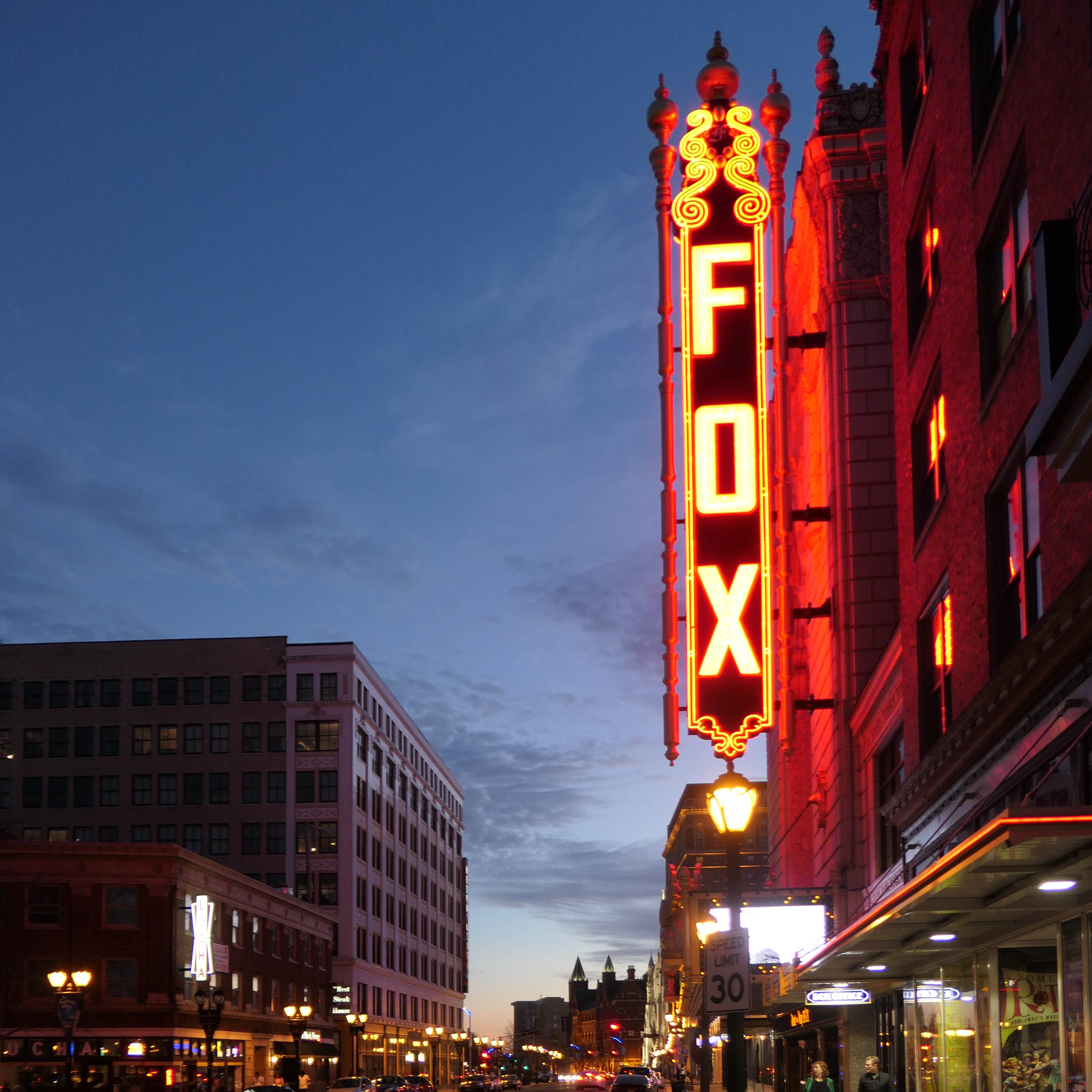 FOX